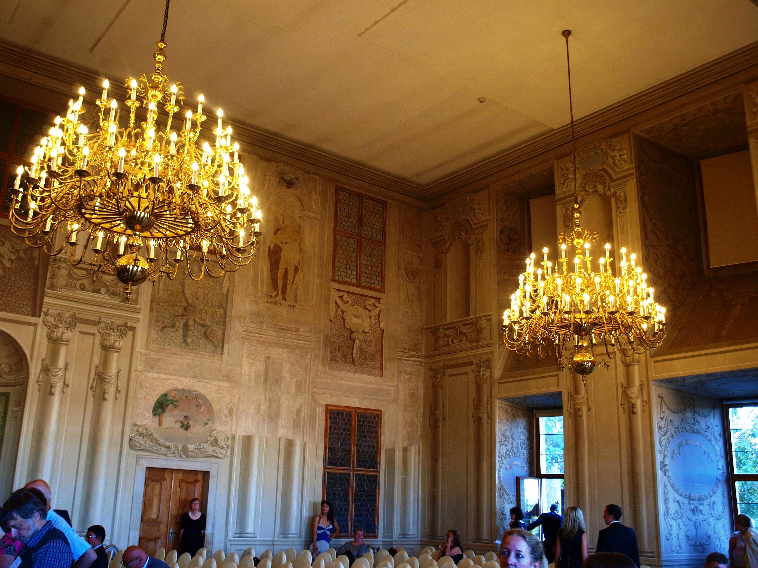 Lobkovický palác na Pražském hradě